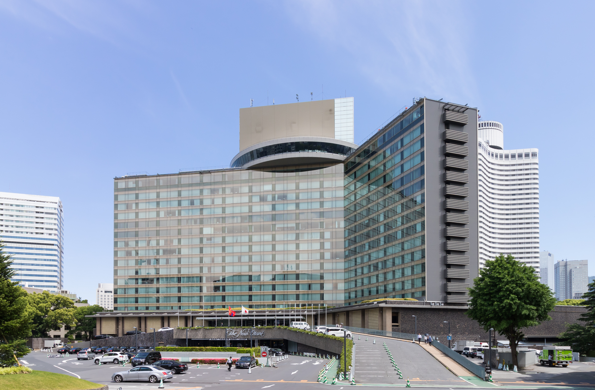 ホテルニューオータニ,ザ・メイン